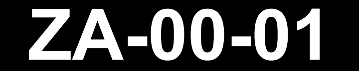 中文（香港）: 澳門車輛登記號碼（駐澳部隊）